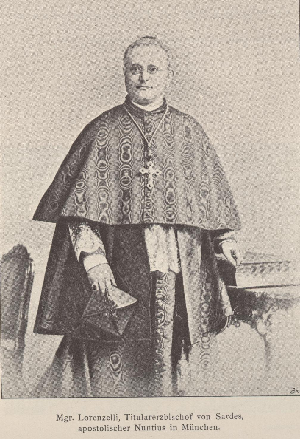 Kardinal Benedetto Lorenzelli Apostolischer Nuntius München